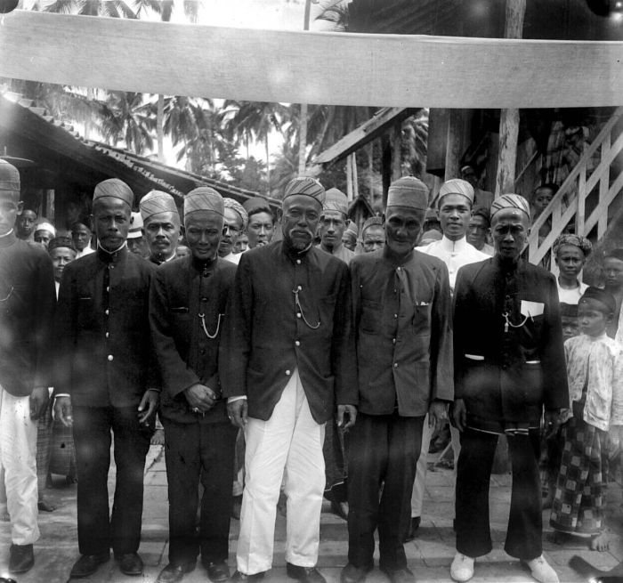 Negatief. Hoofden van Palembang